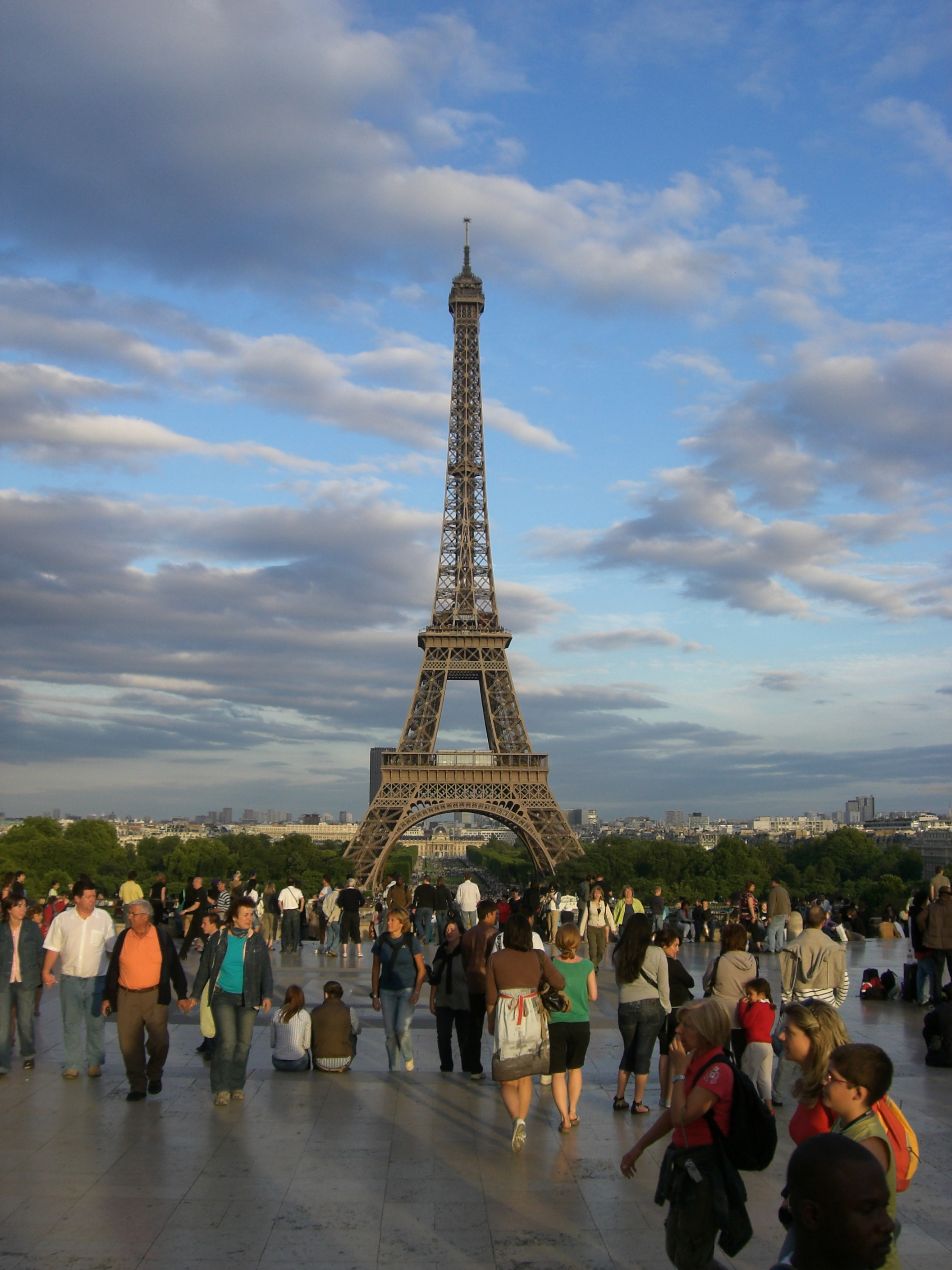 Touristes sur le parvis des Droits de l'Homme, XVIe arrondissement, Paris, France.